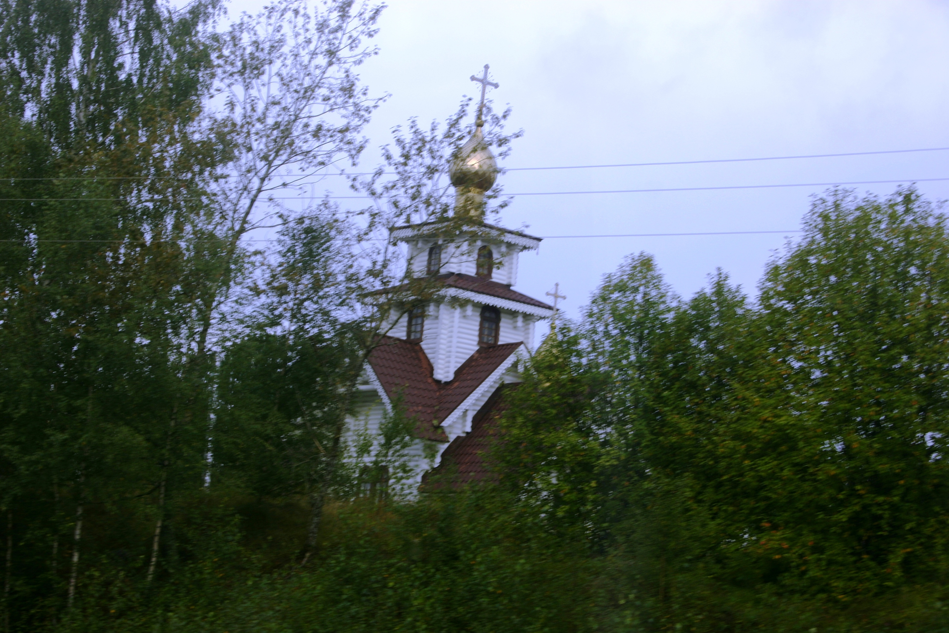 Säkkijärven uusi ortodoksikirkko vuonna 2009